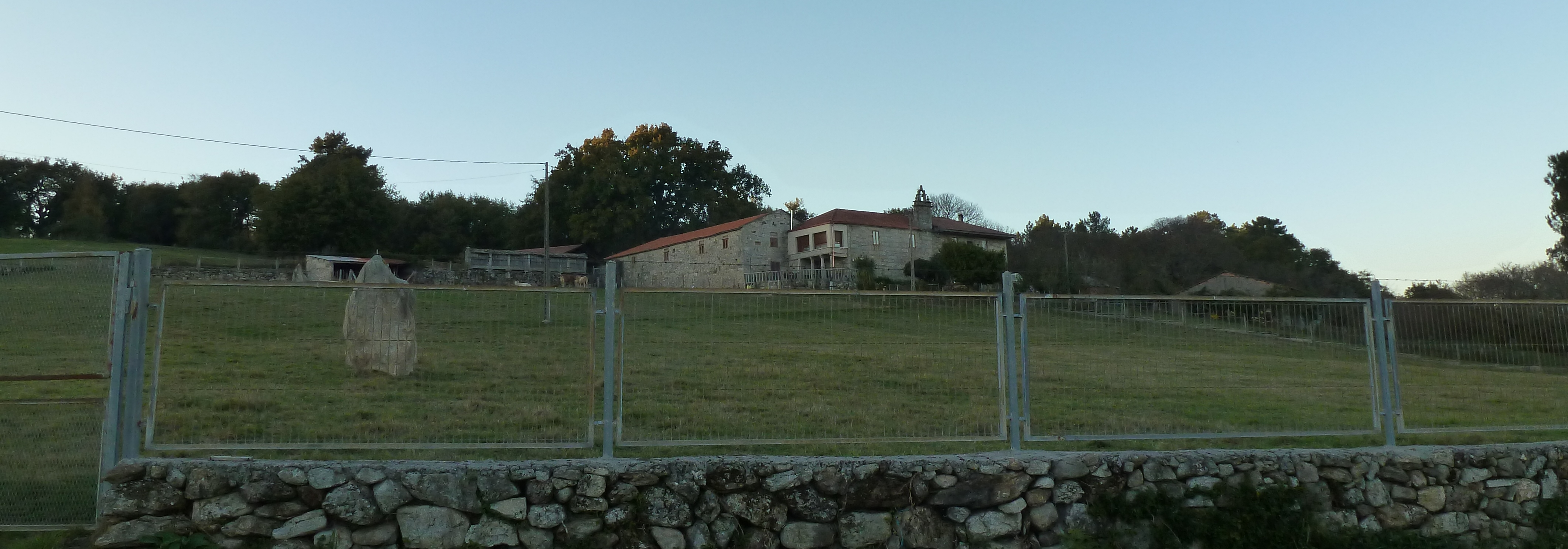 A Casa Grande de Buciños, Carballedo